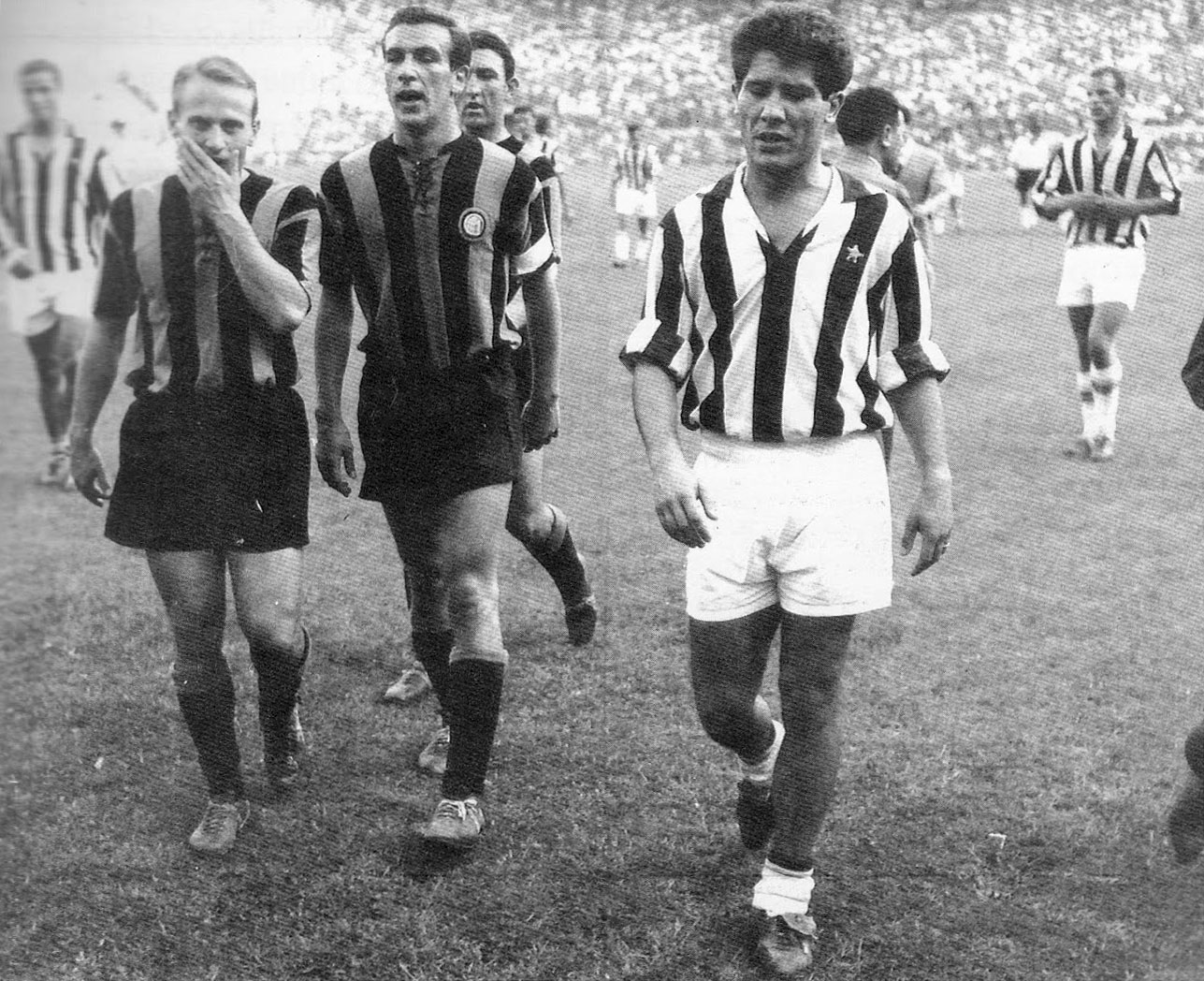 Milano, stadio San Siro, 13 settembre 1959. Gli interisti Mauro Bicicli (a sinistra) e Antonio Angelillo (al centro), e lo juventino Omar Sívori (a destra), escono dal campo all'intervallo della finale di Coppa Italia 1958-59 tra Inter e Juventus (1-4); sullo sfondo s'intravedono inoltre i bianconeri Bruno Nicolè (a sinistra) e John Charles (a destra), e il nerazzurro Eddie Firmani (al centro).